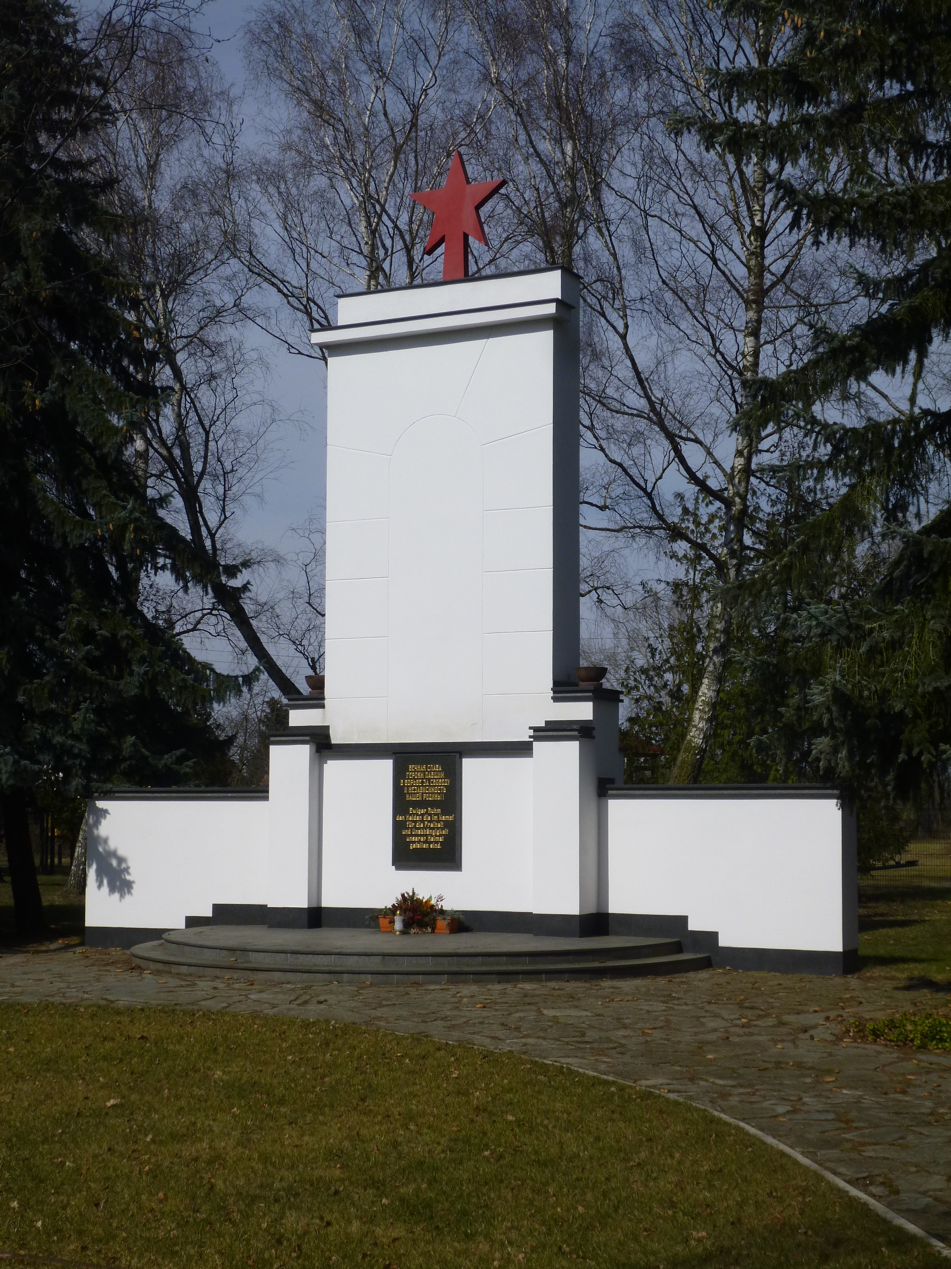 Sowjetischer Ehrenfriedhof Reitwein 2018